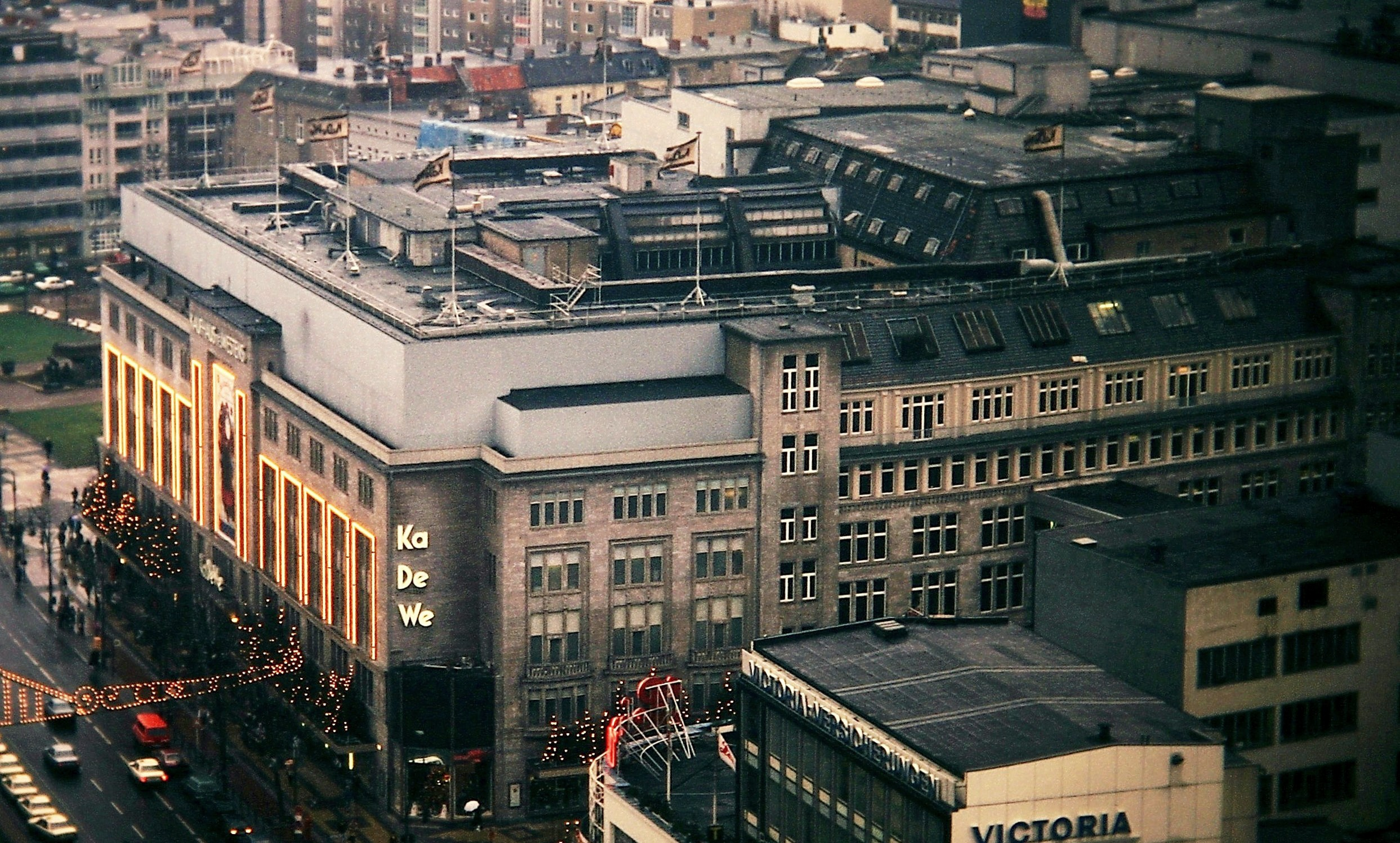 KA DE WE mit Weihnachtsbeleuchtung, Berlin 1988